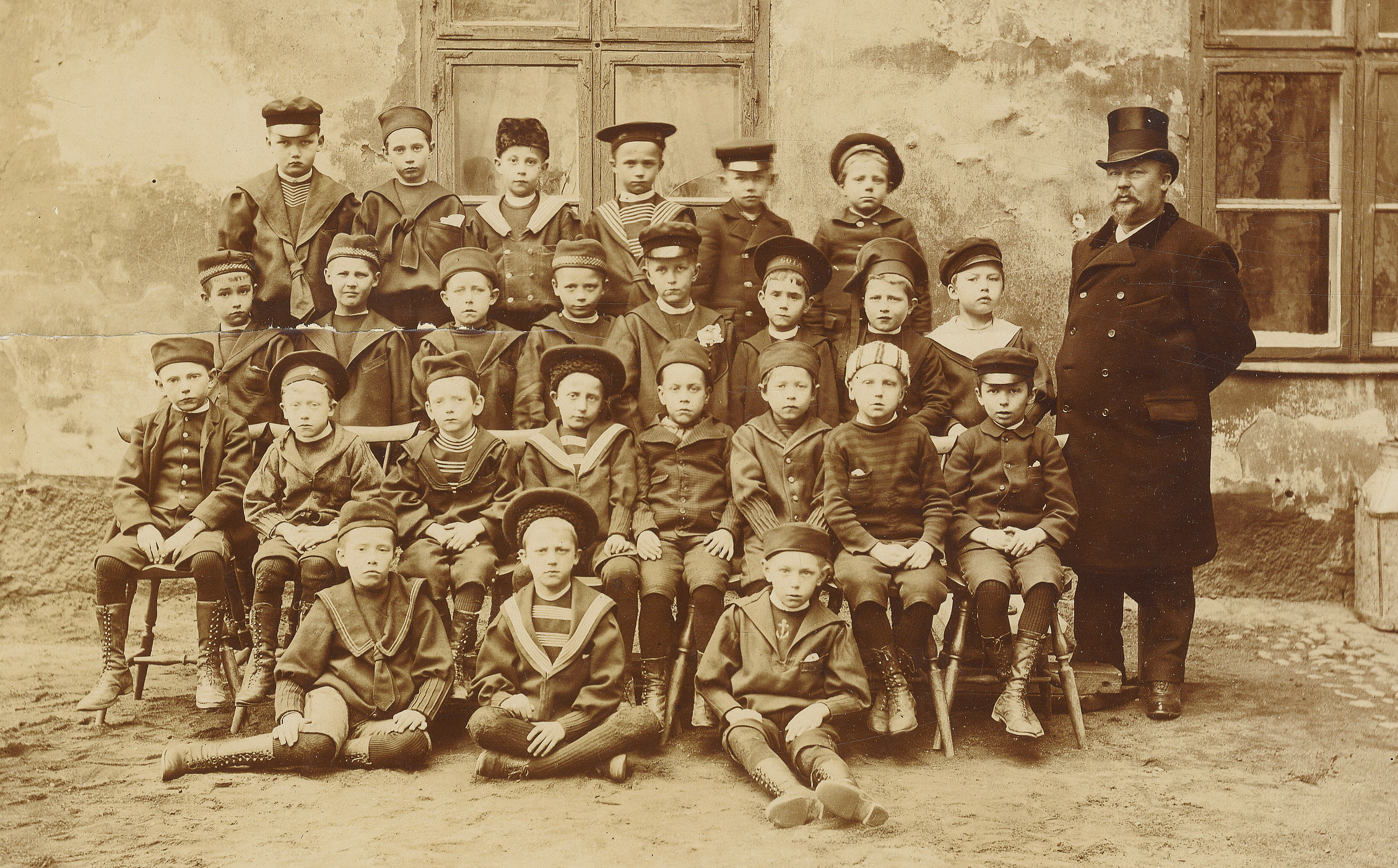 Ångmanska skolan för gossar på van der Nootska palatsets bakgård